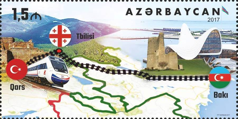 Baku-Tbilisi-Kars Railway N 1321 – 1.5 manat – On October 30, 2017 the railway line of Baku-Tbilisi-Kars is officially launched. There are pictured the Baku-Tbilisi-Kars railway route connecting Azerbaijan, Georgia and Turkey on the souvenir sheet and stamp.